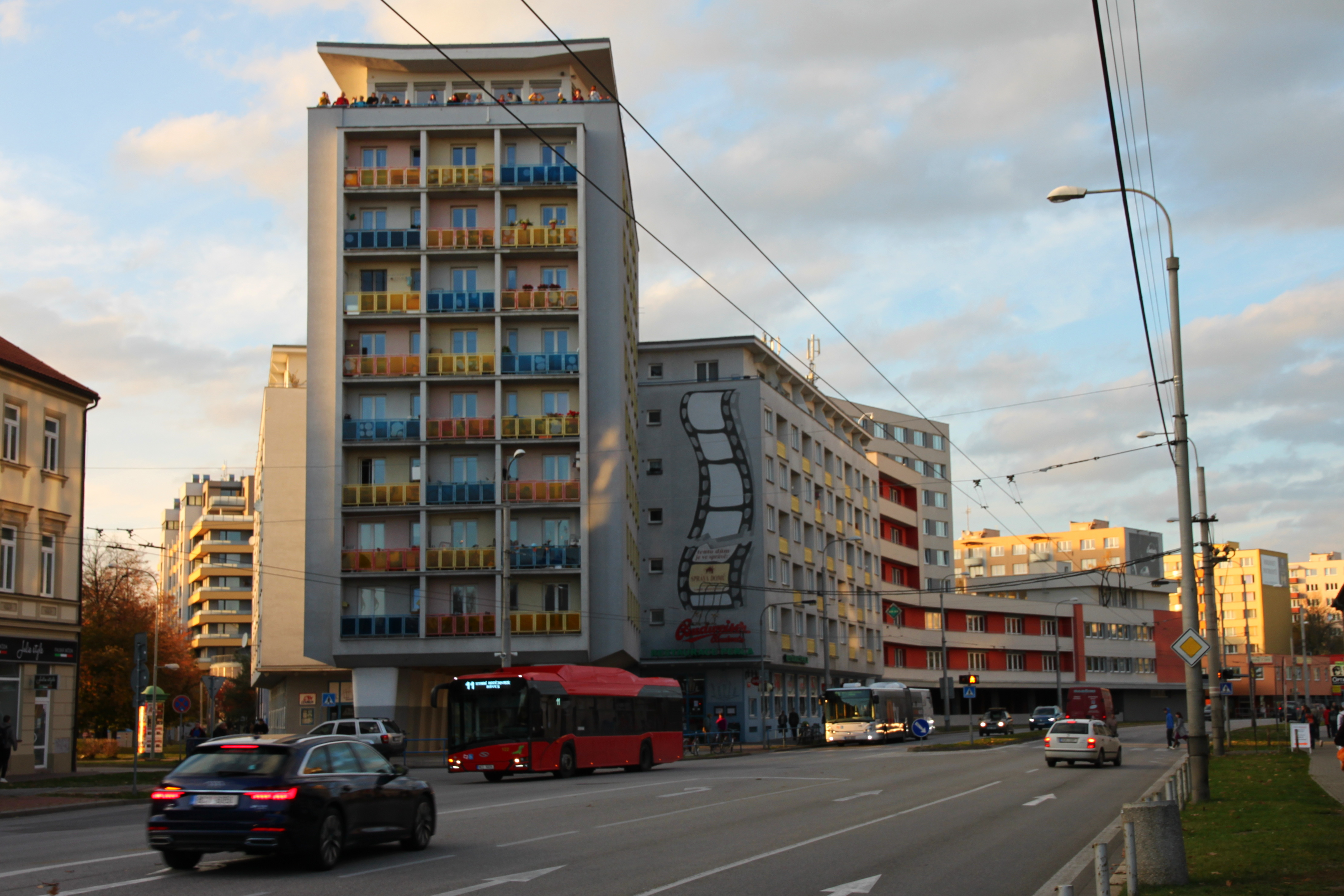 Koldům (kolektivní dům) byl postaven v letech 1959 až 1964 jako obytný dům hotelového typu s restaurací, vyhlídkovou kavárnou "Perla" a kinem "Vesmír". Je situován na rohu Pražské třídy a Staroměstské ulice v Českých Budějovicích. Projekt vytvořili architekti Bohumil Böhm, Jaroslav Škarda a Bohumil Jarolím.